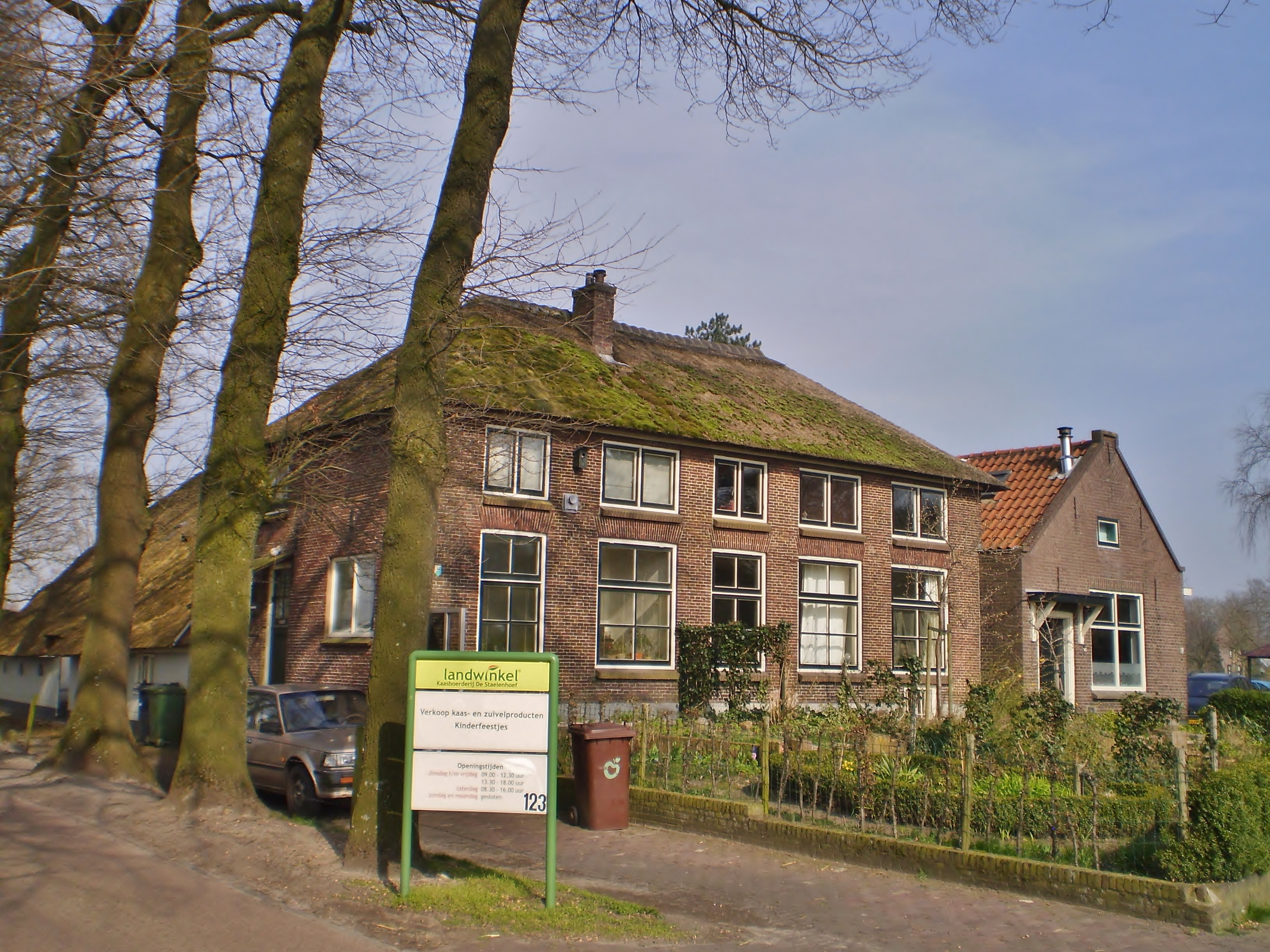 Birktstraat 125